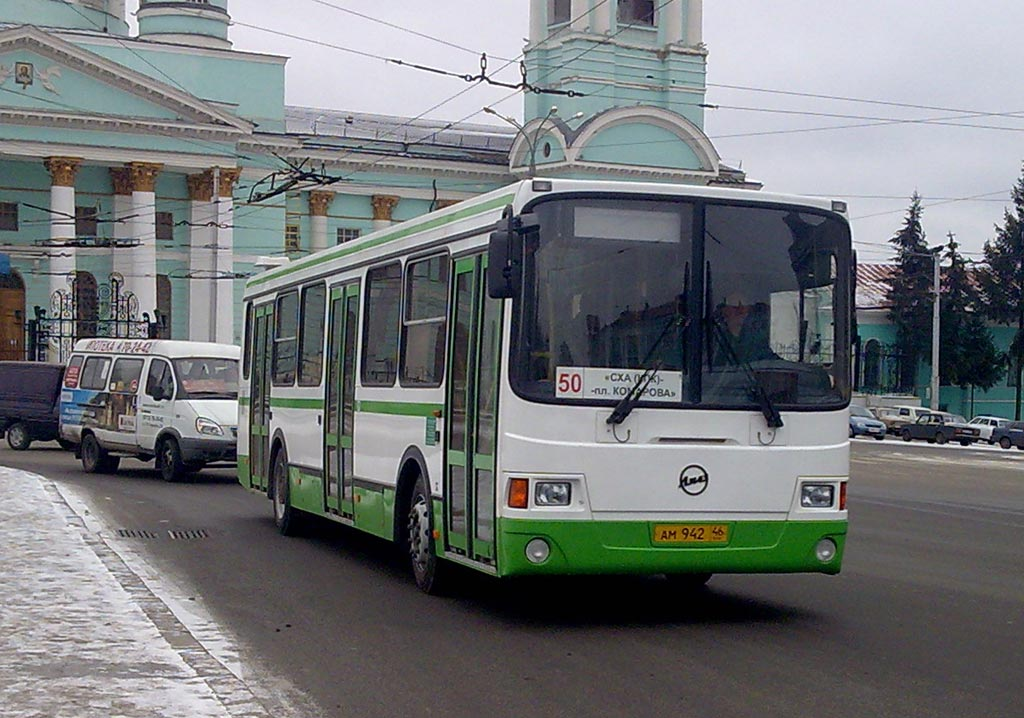 Автобус ЛиАЗ-5256.26 50-го маршрута на улицах города Курска